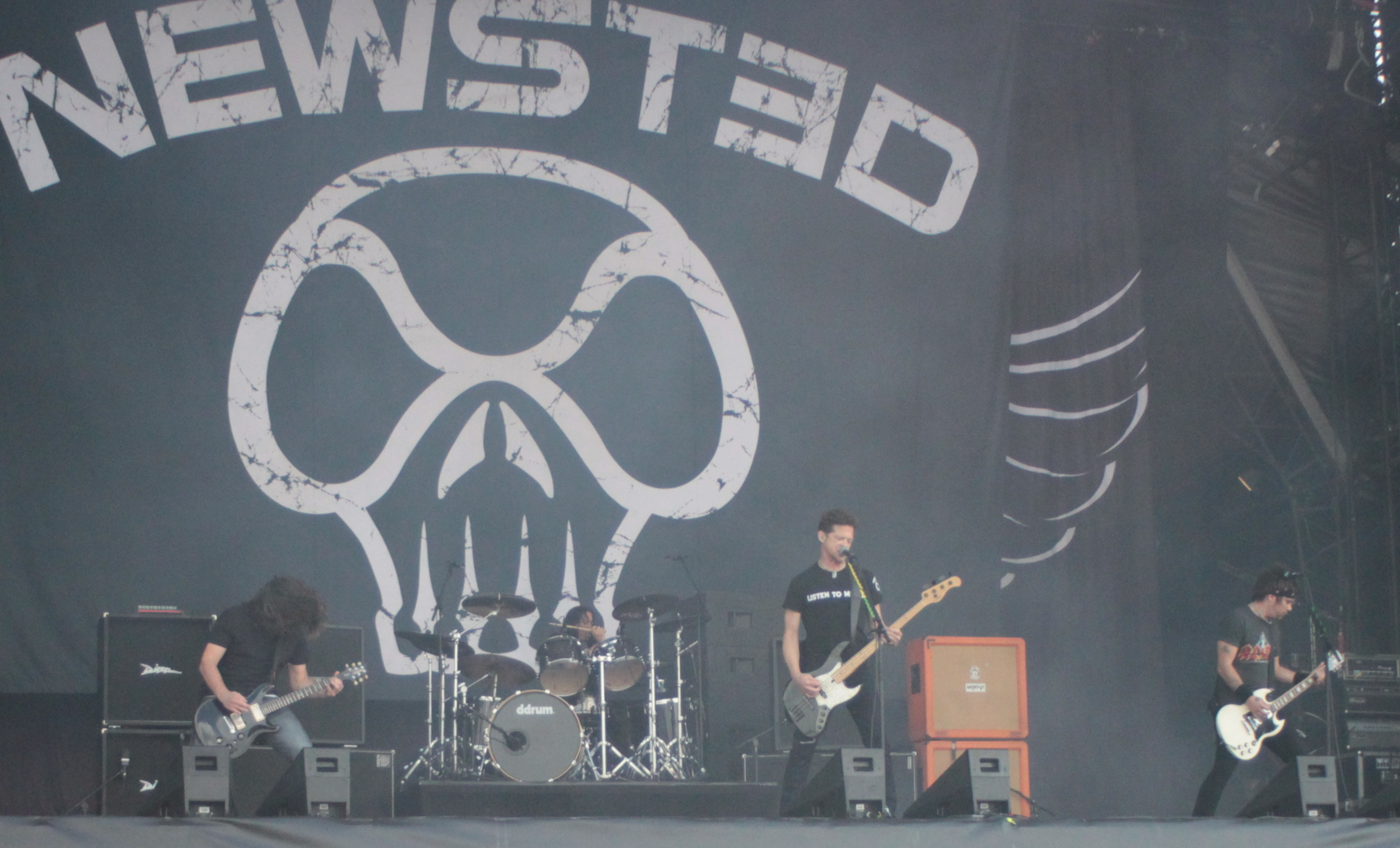 Newsted, Hellfest 2013, Fr-44-Clisson.